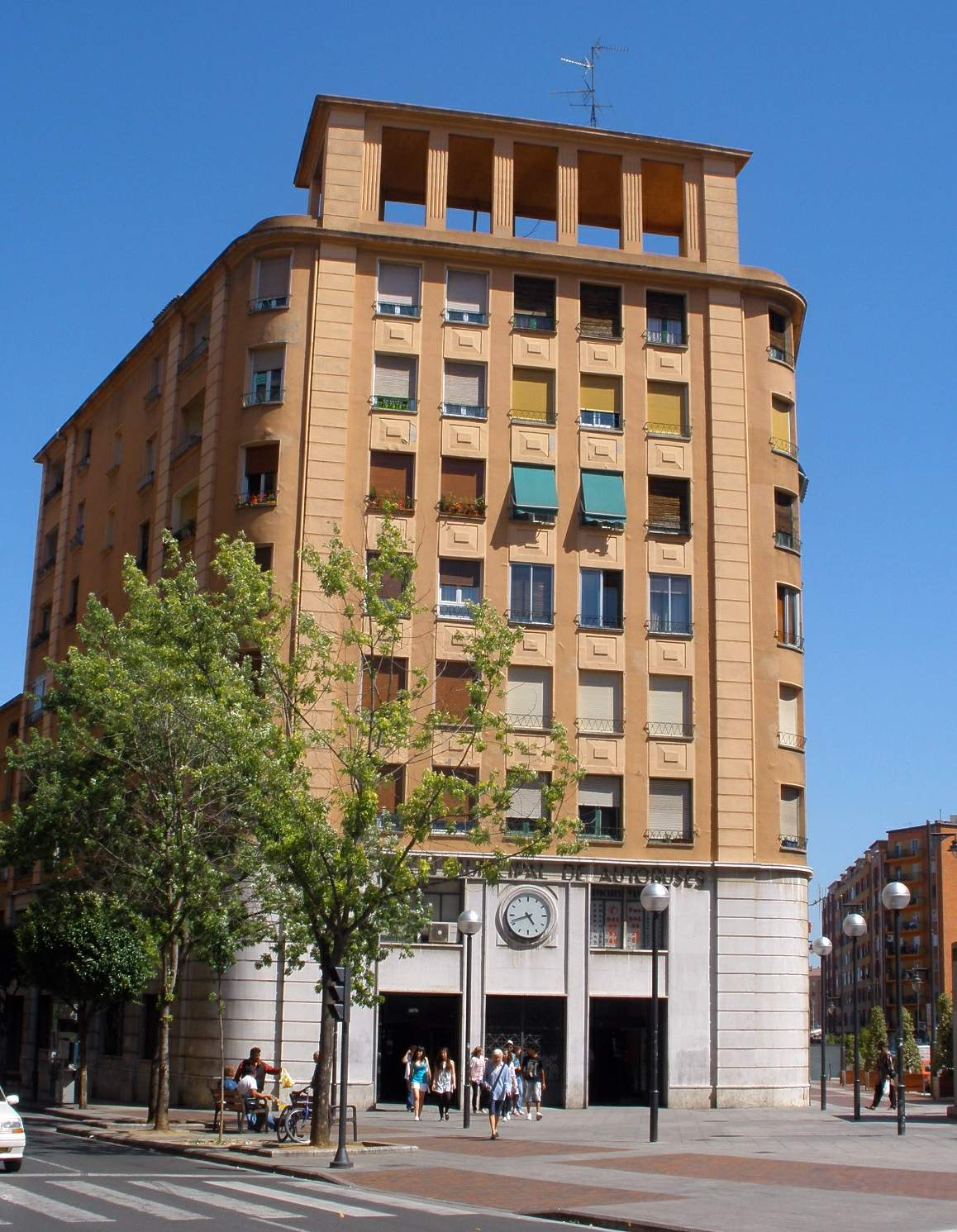 estación de autobuses de Logroño